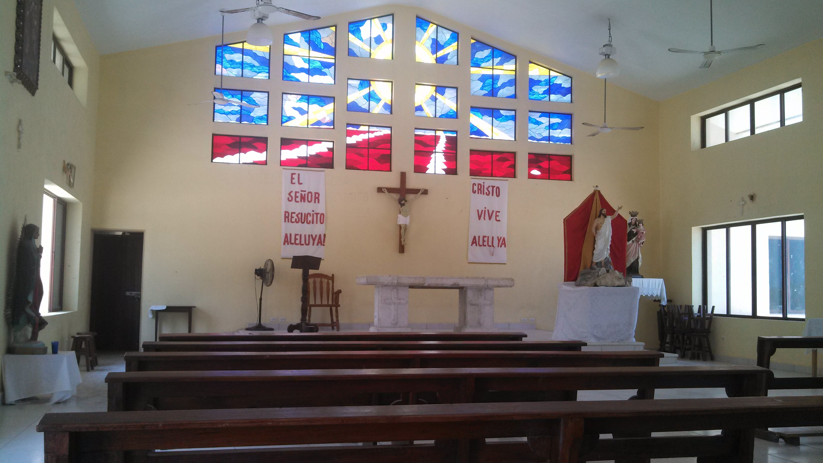 Iglesia (interior)